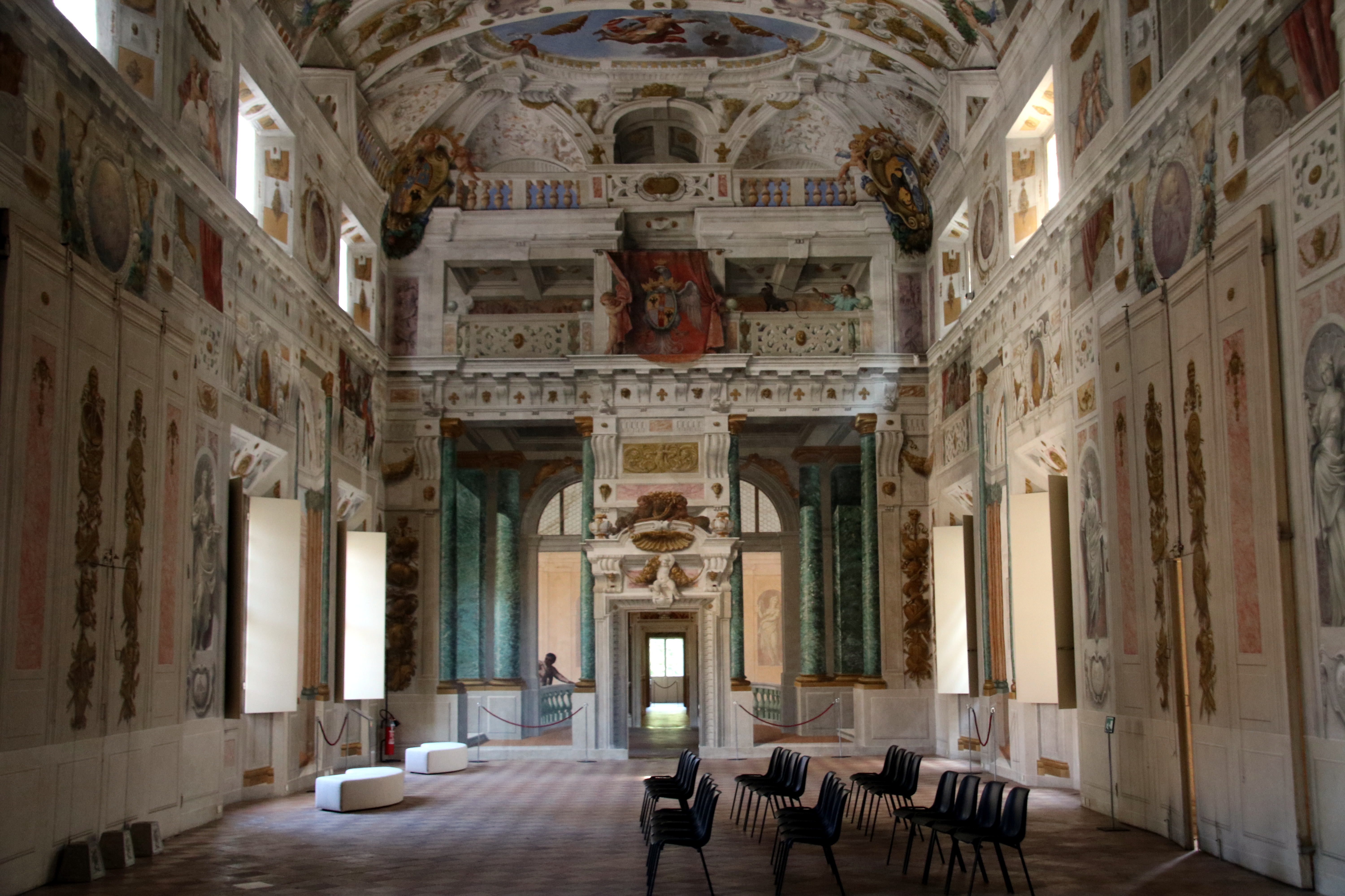 Palazzo Ducale This is a photo of a monument which is part of cultural heritage of Italy.